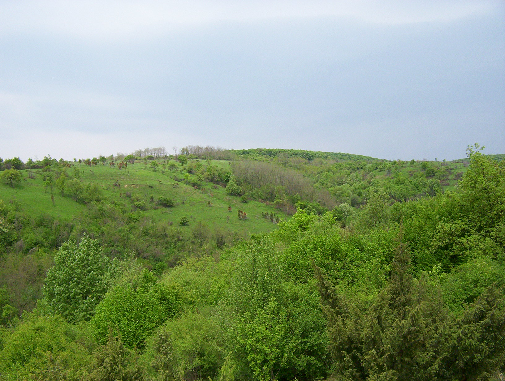 Fruška Gora in Vojvodina, Serbia. prelep nacionalni park posetite ga!!